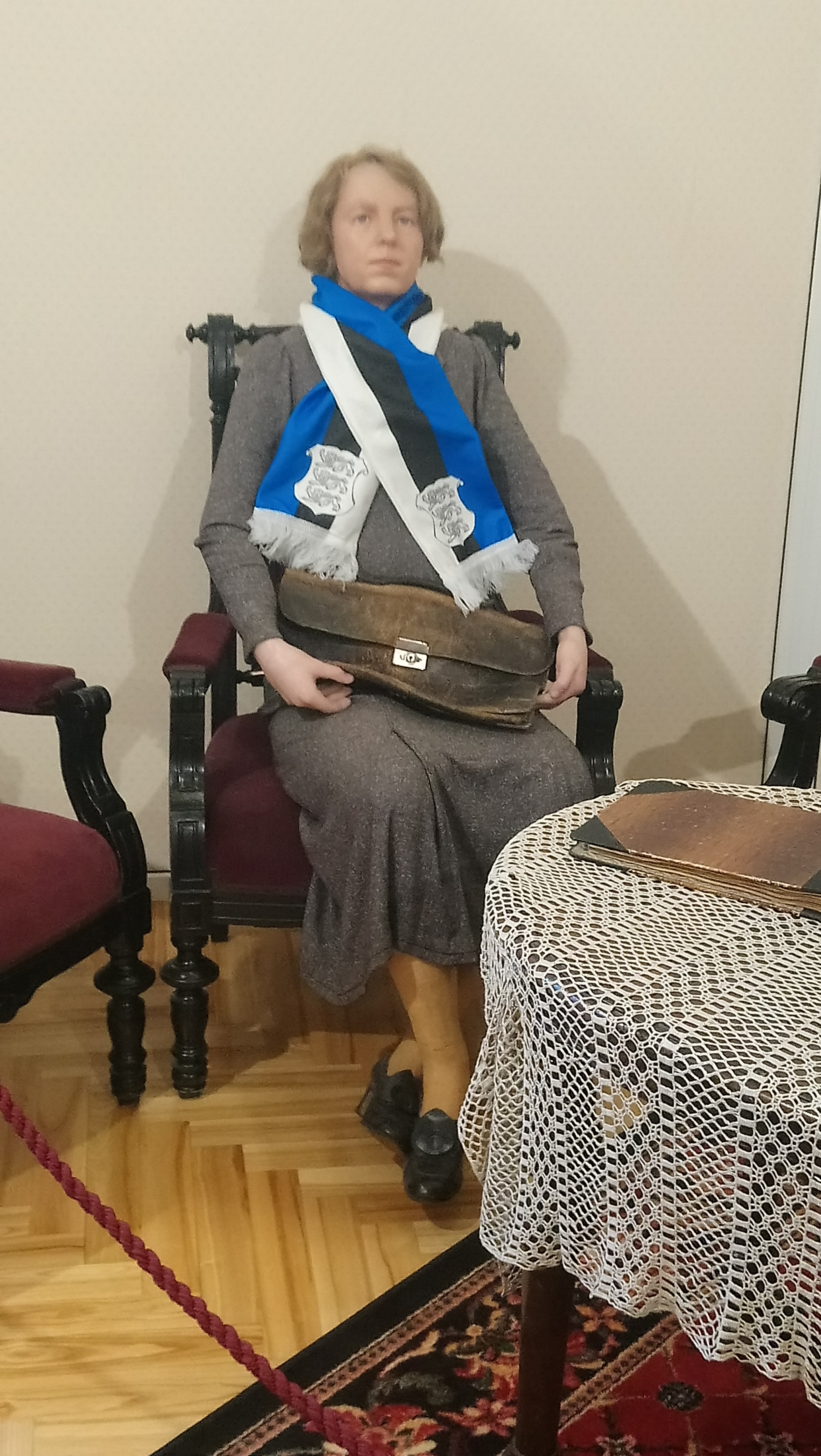 Pilt on tehtud Valga linnamuuseumis